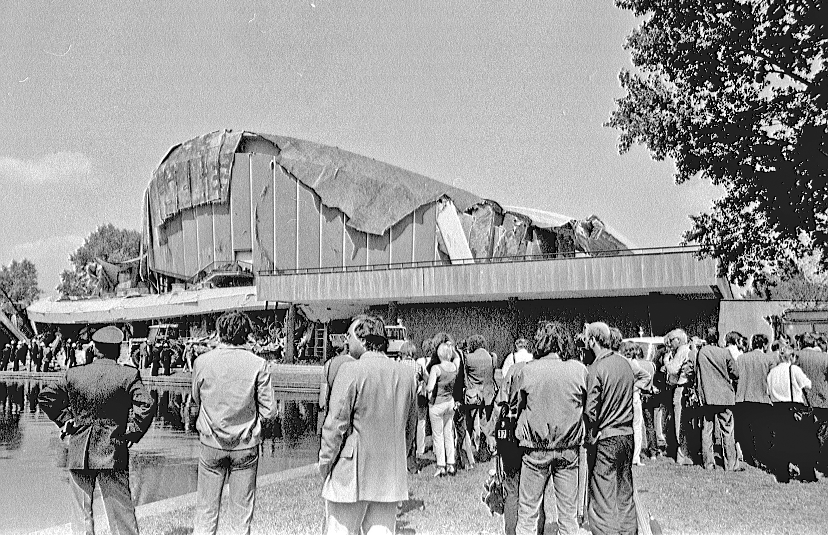 Kongresshalle Berlin